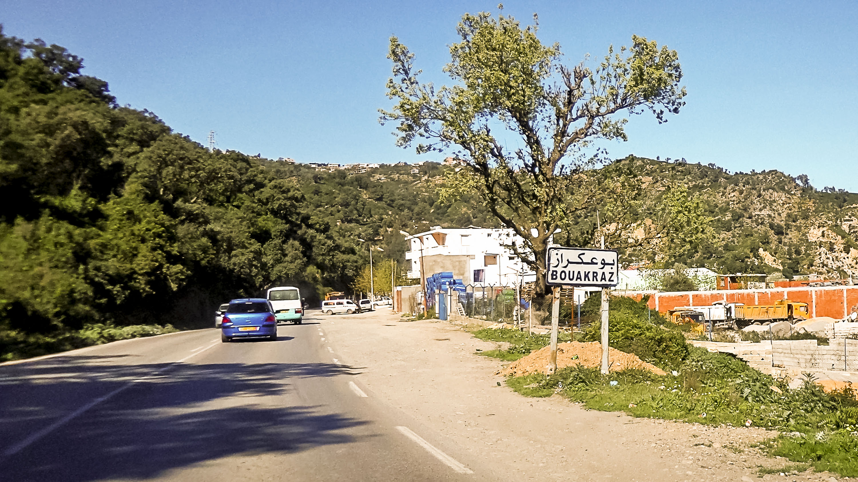 Bouakraz - Souk El Tenine بوعكراز - سوق الاثنين Souk El Tenine, wilaya de Bejaia ولاية بجاية - سوق الاثنين